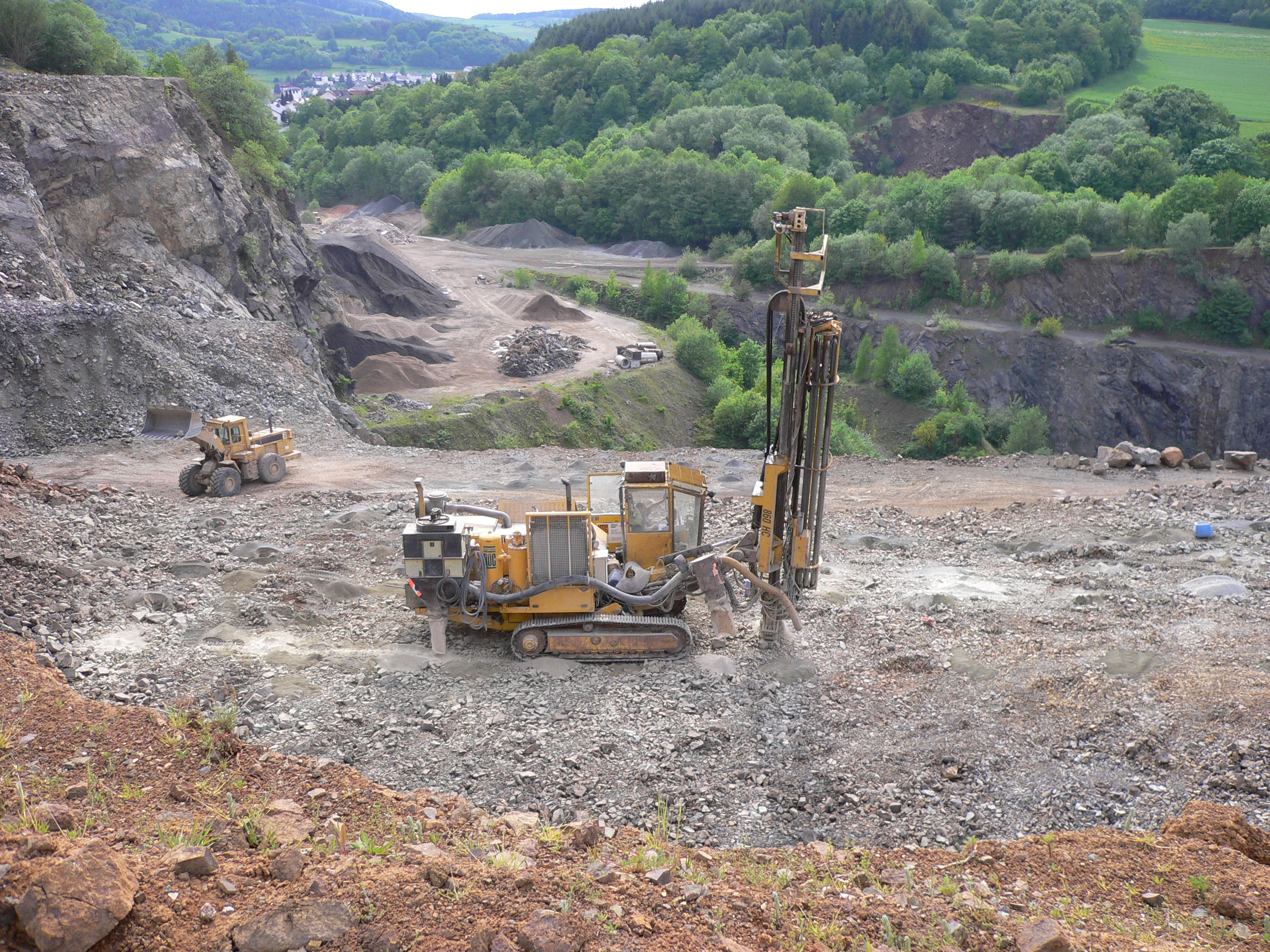 Diabas-Steinbruch "Hahnkopf" in Bad Endbach-Wommelshausen mit einem Radlader und einem Senkhammerbohrgerät "ROC 860 HC" mit Atlas-Copco-Kompressor